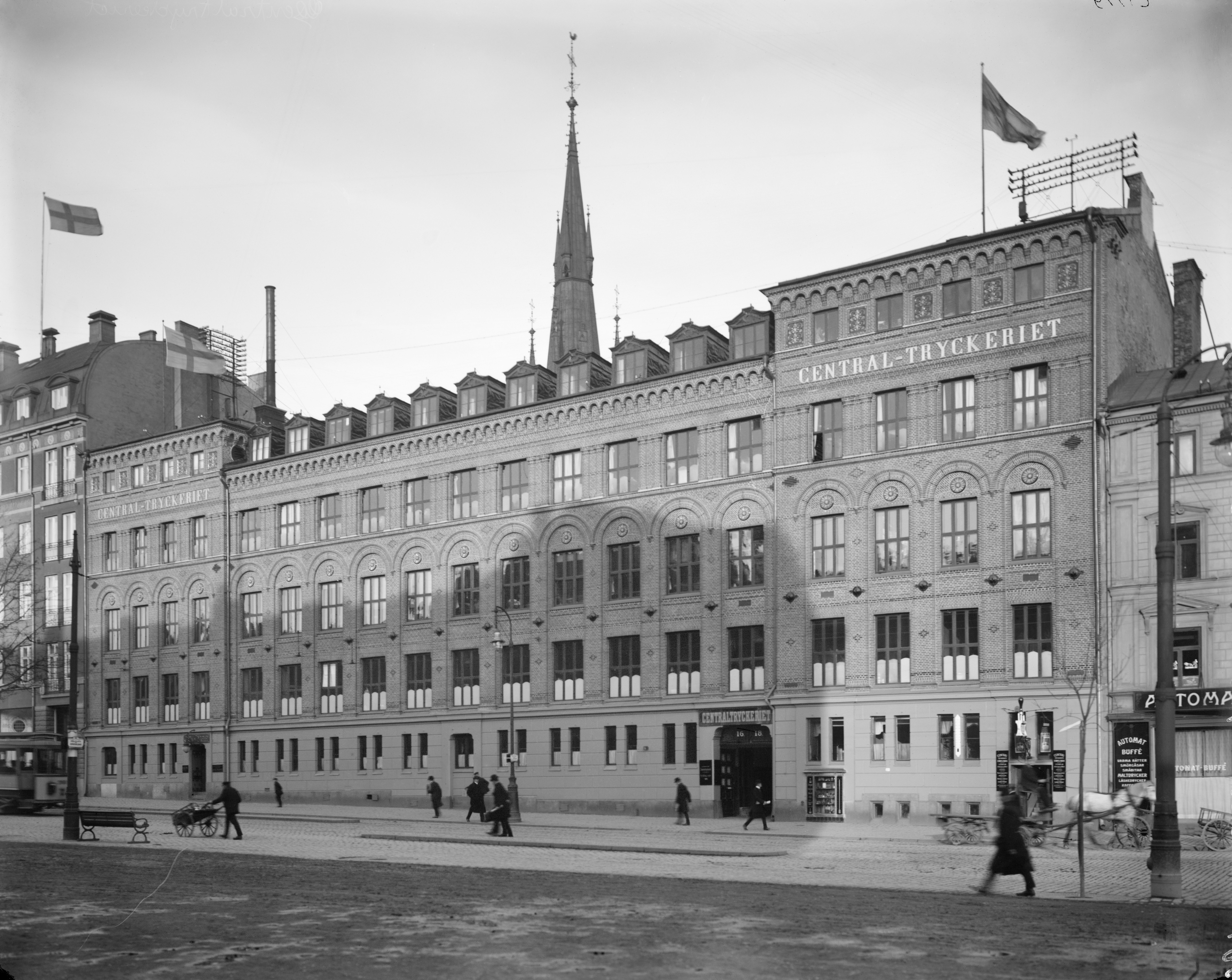 Centraltryckeriet på Vasagatan 16-18 1905